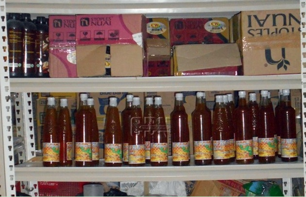 Madu asli Pugima (MAP) dari peternak lebah madu Pilamo Mandiri, Wamena, Jayawijaya, Papua